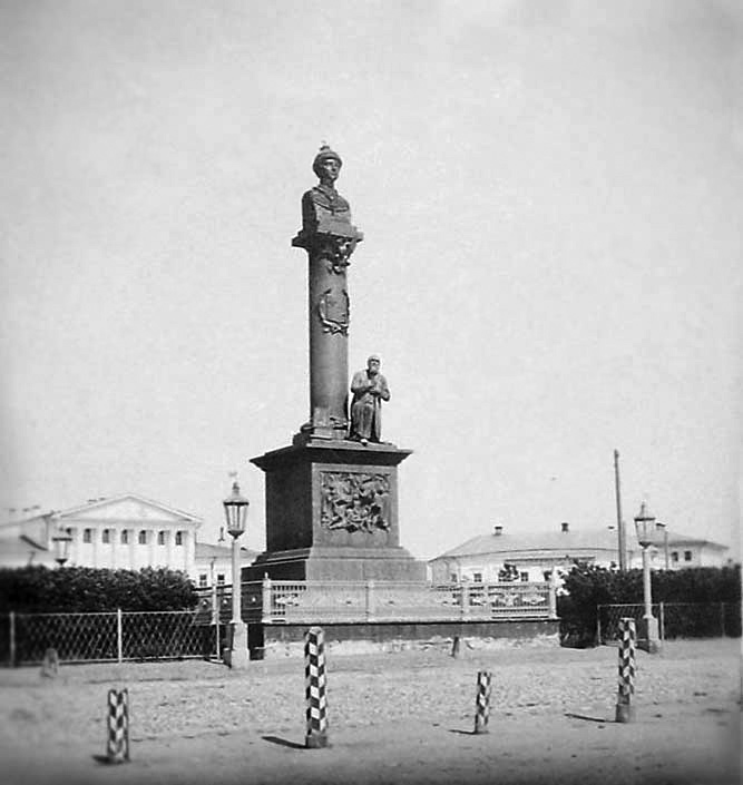 Памятник